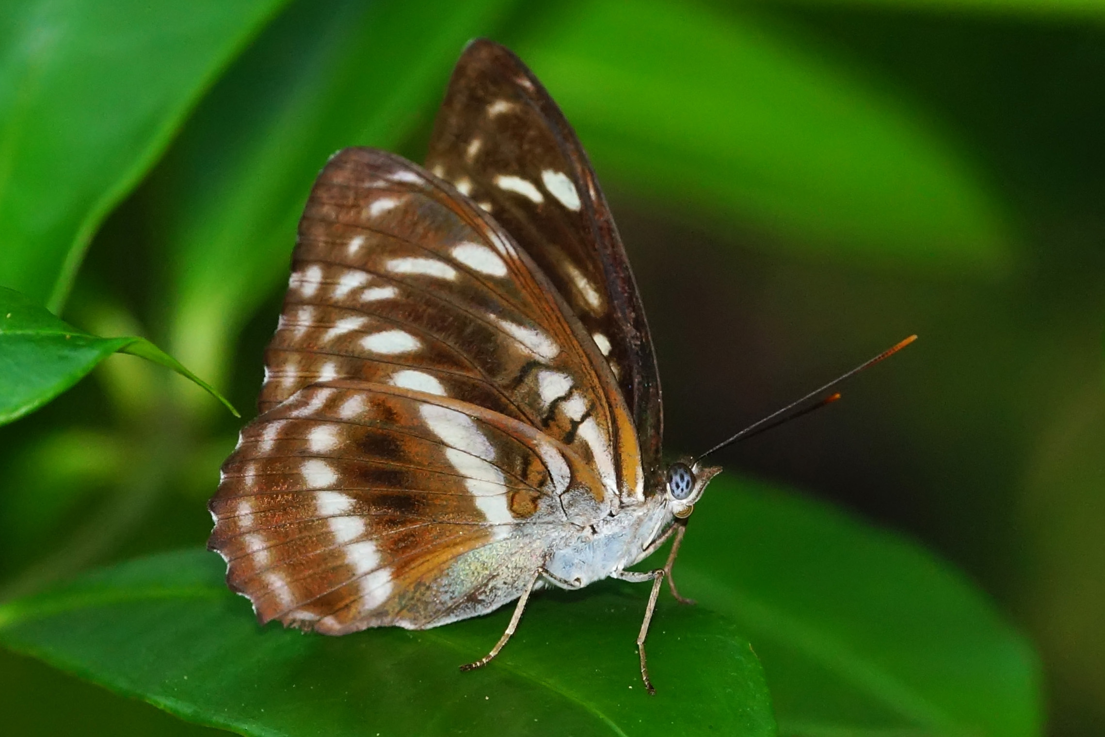 異紋帶蛺蝶 Athyma selenophora laela